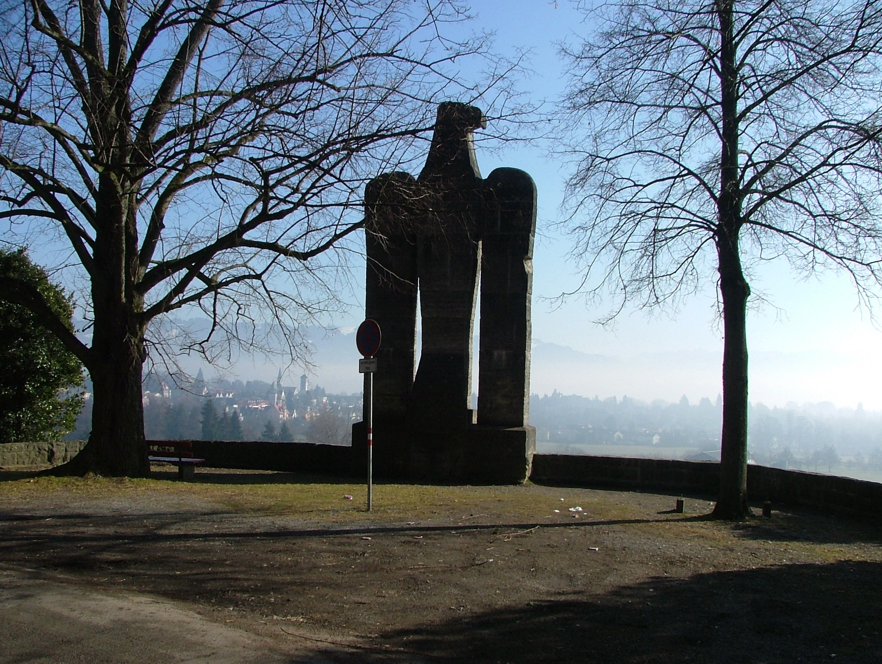 Denkmal auf dem Hoyerberg